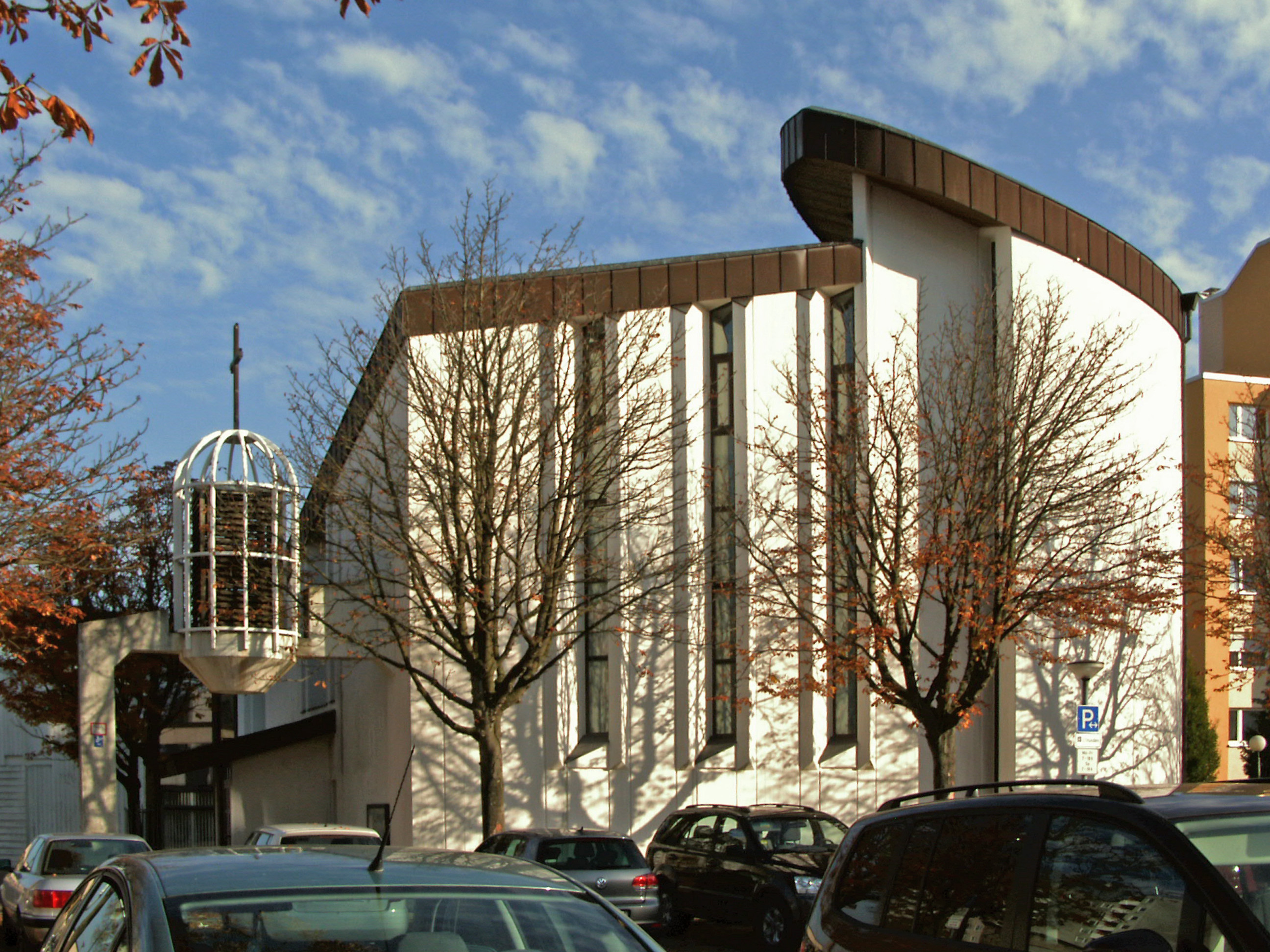 Evangelisch-lutherische Bonhoeffer-Kirche in Wolfsburg, Stadtteil Westhagen. 1995 erbaut.